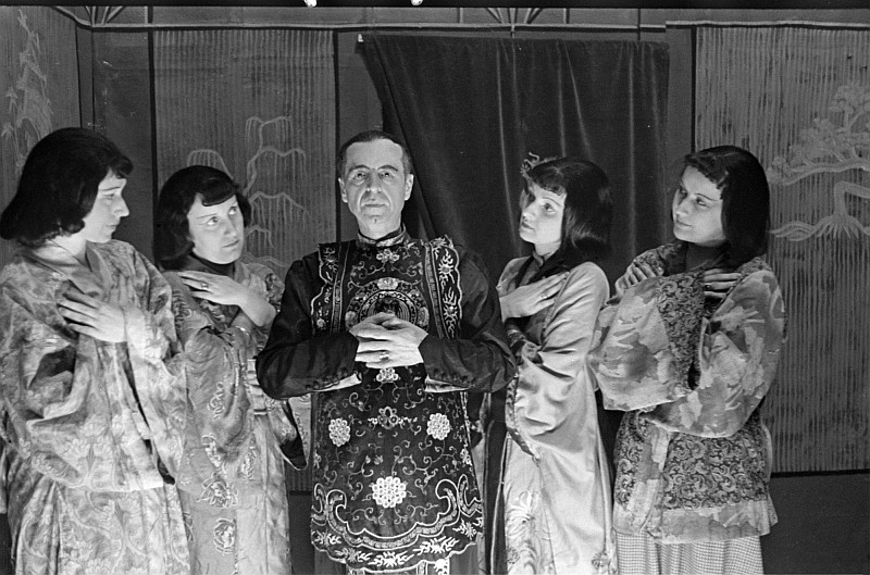 Original image description from the Deutsche Fotothek Szenenbilder